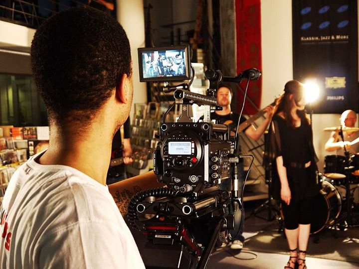 Michael Dzovor beim Videodreh mit der Hollywood Kamera RED One MX